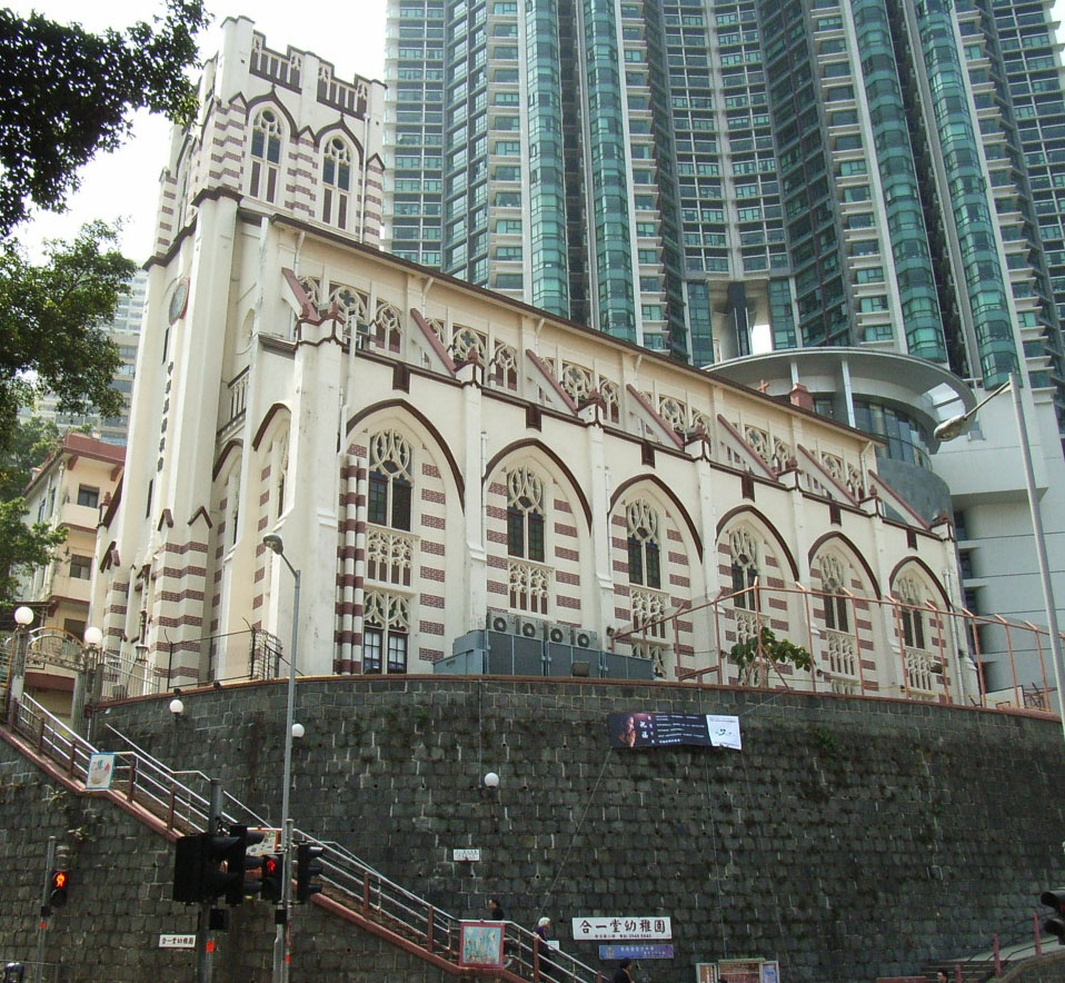 合一堂, 香港zh:西營盤zh:般含道2號 The Hop Yat Church, Hong Kong